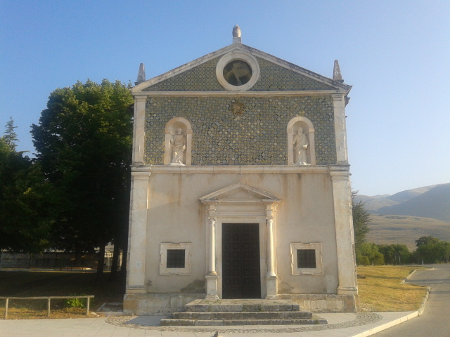 Chiesa di Santa Maria delle Grazie a Collarmele